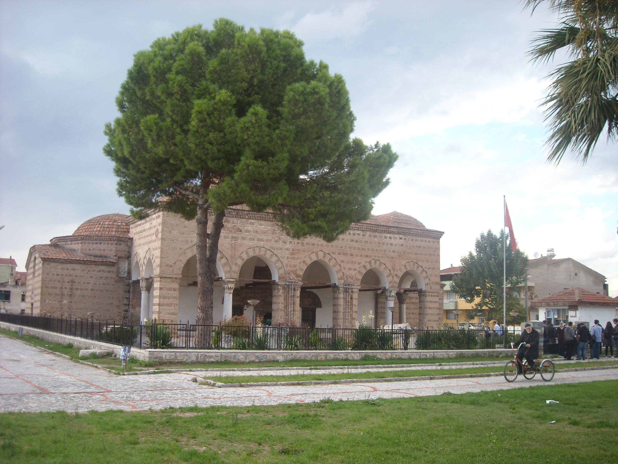 İznik Müzesi